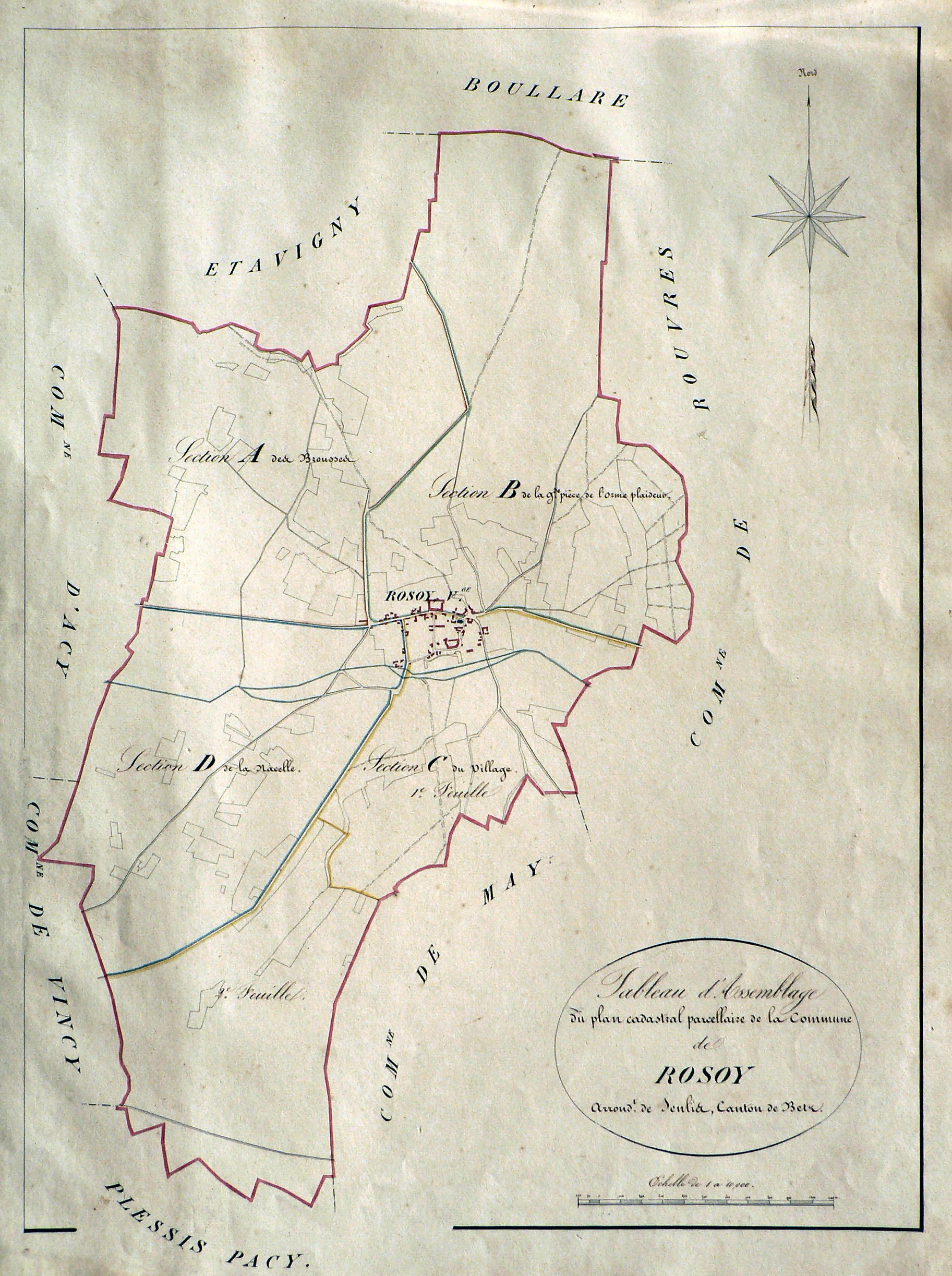 tableau d'assemblage du plan cadastral parcellaire de la commune de Rosoy-en-Multien